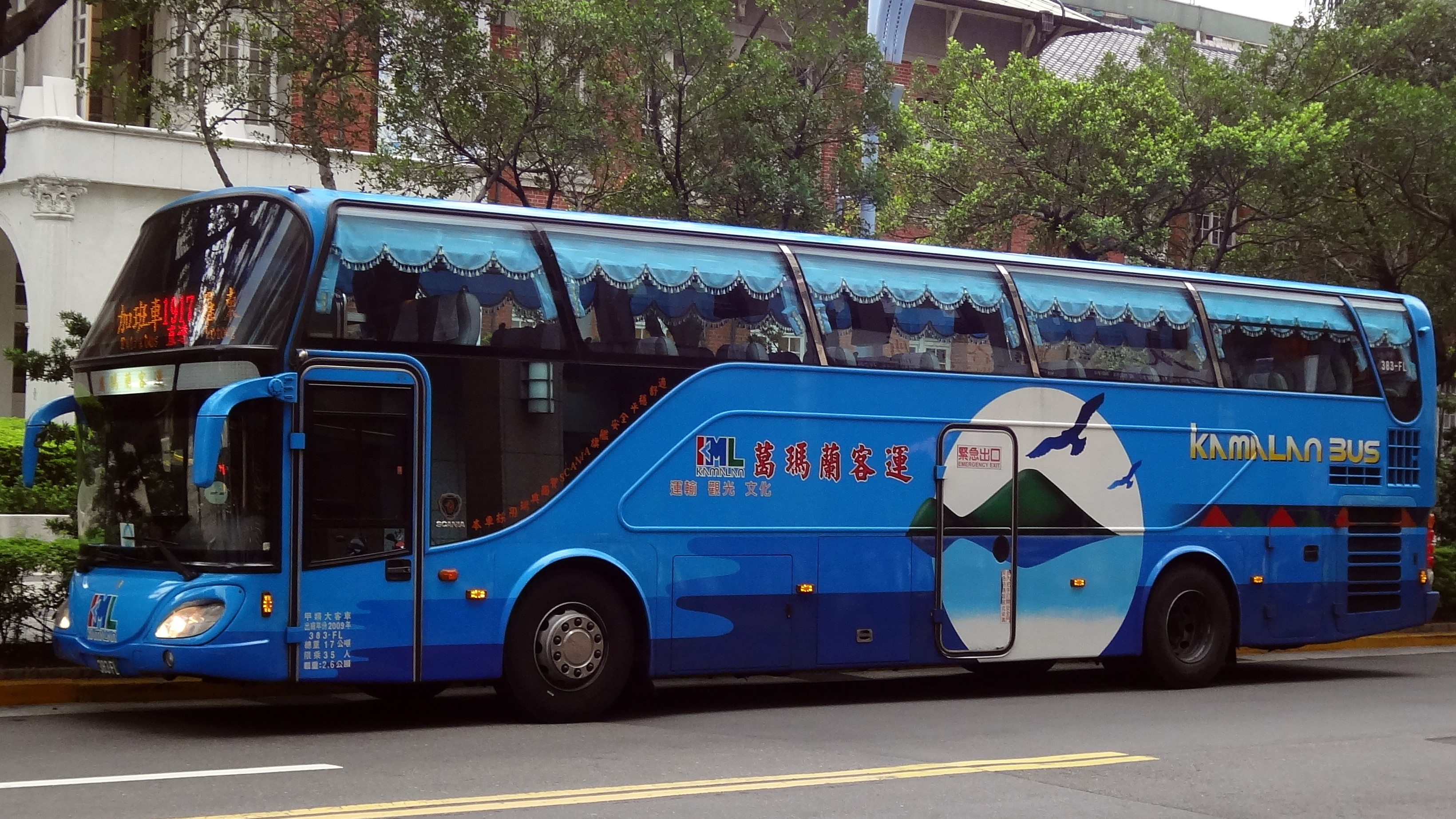 葛瑪蘭客運2009年Scania K380IB大客車383-FL左側外觀。